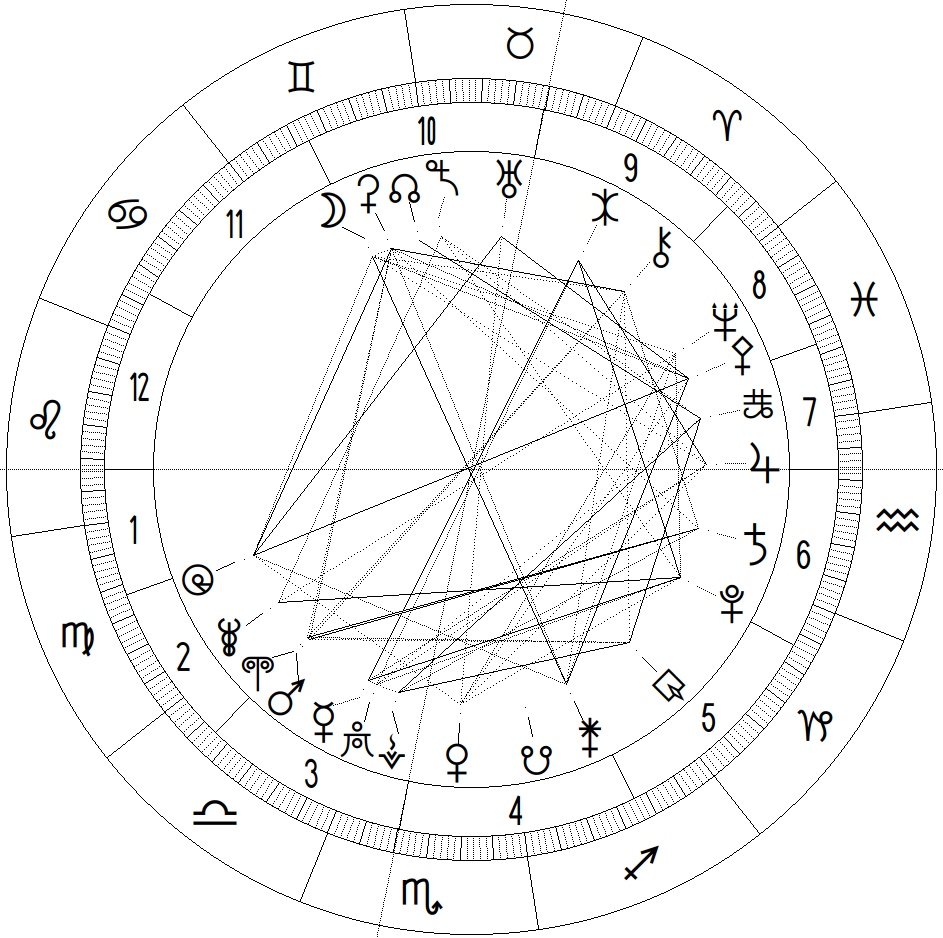 Horoscope, Astrology